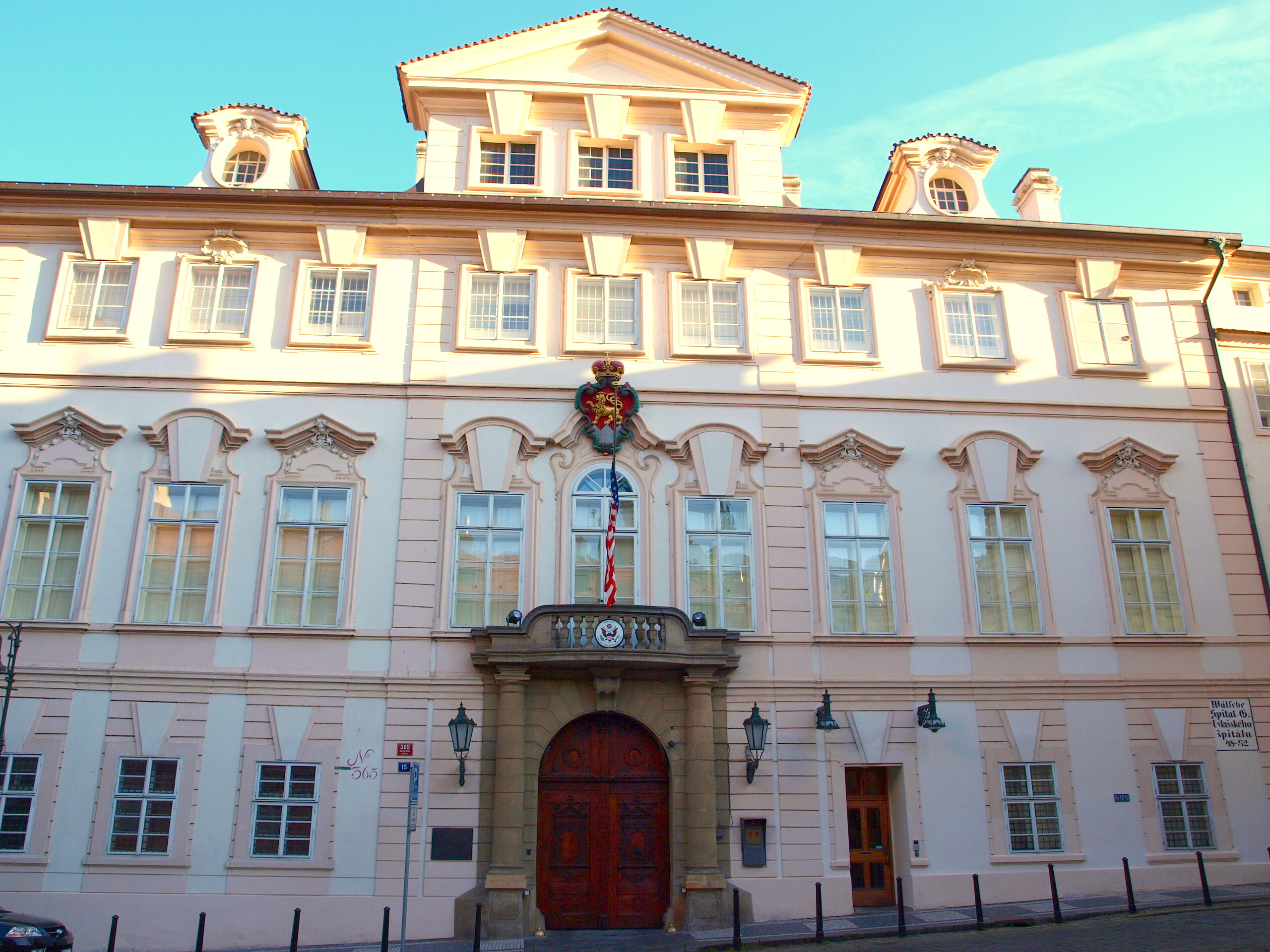 Schönbornský palác v Praze